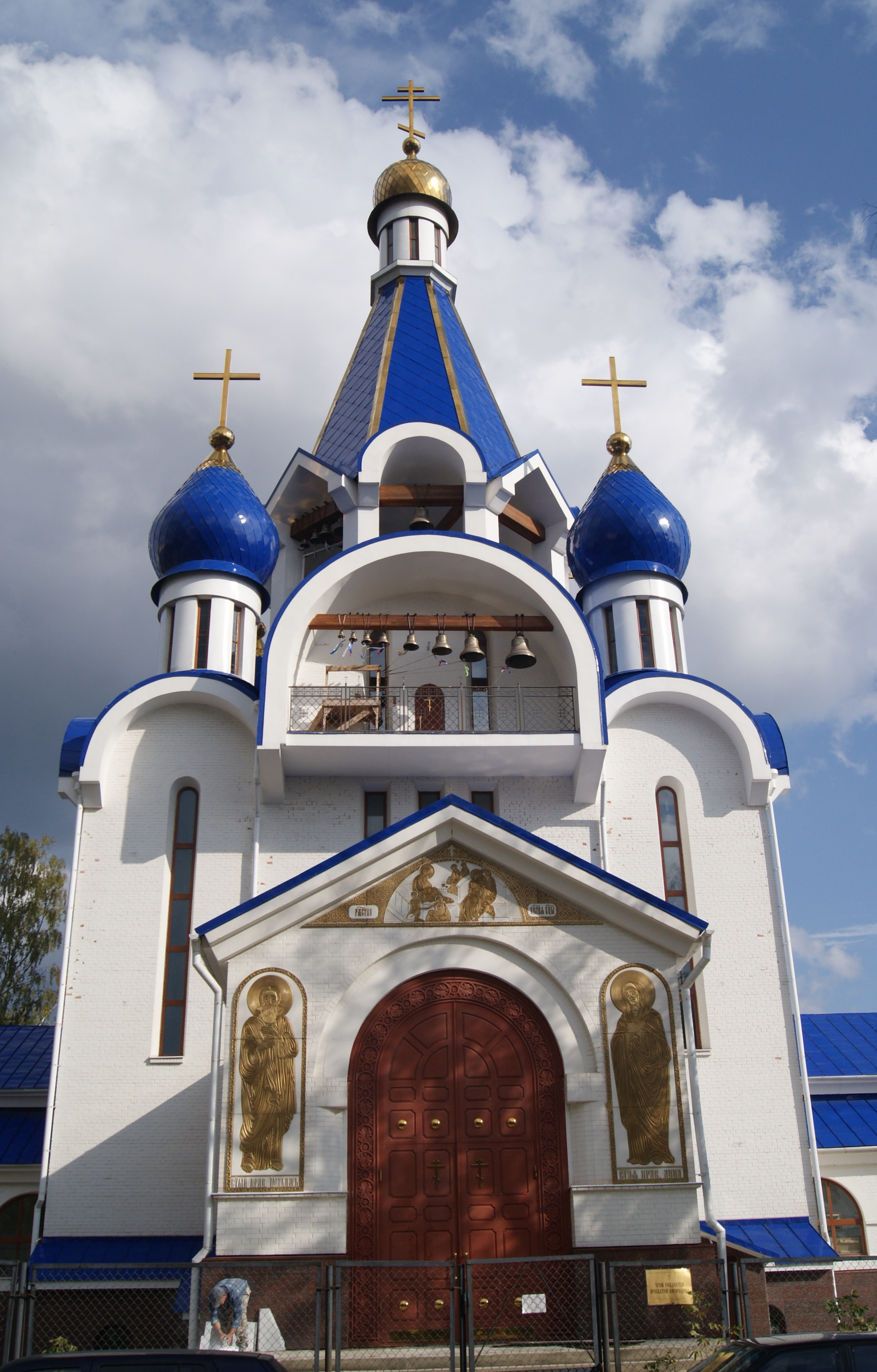 Вход в храм пресвятой богородицы в Костино, г. Королев.